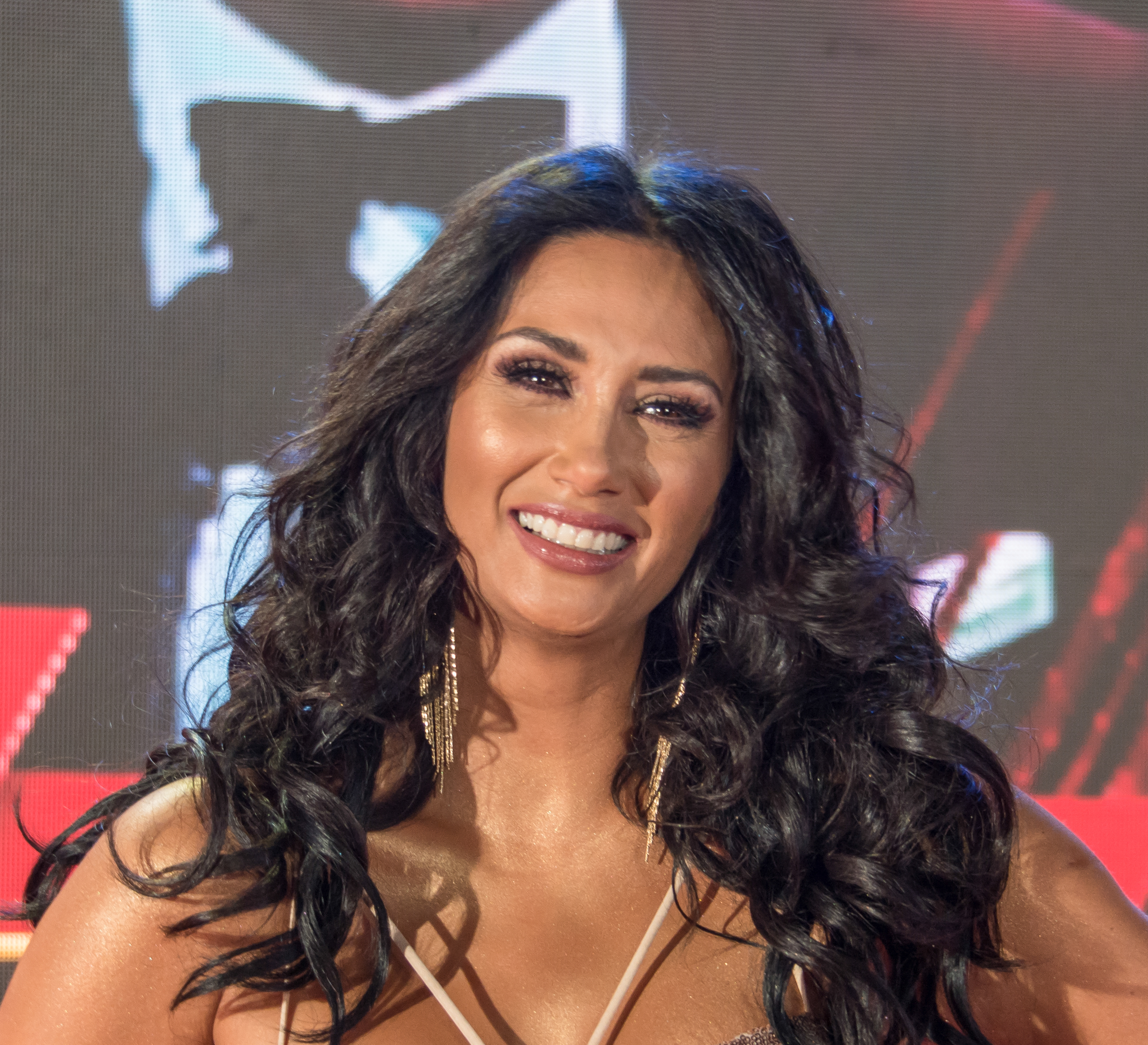 Pamela Díaz, Copihue de Oro 2018, Sun Monticello, Mostazal, Región de O'Higgins, Chile